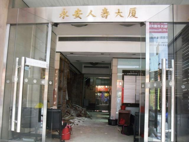 中文（香港）: 永安人壽大廈正門(2010年10月)